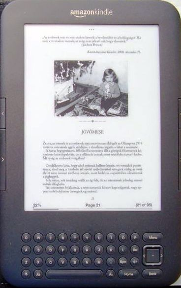 Amazon Kindle könyvolvasó. Jávori István: Változástenger című kötetének egy oldala (Karácsony előtt - fotó, és a Jövőmese részlete) látható a képen.